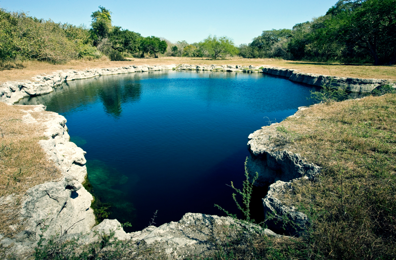 Turismo De Aldama Tamaulipas